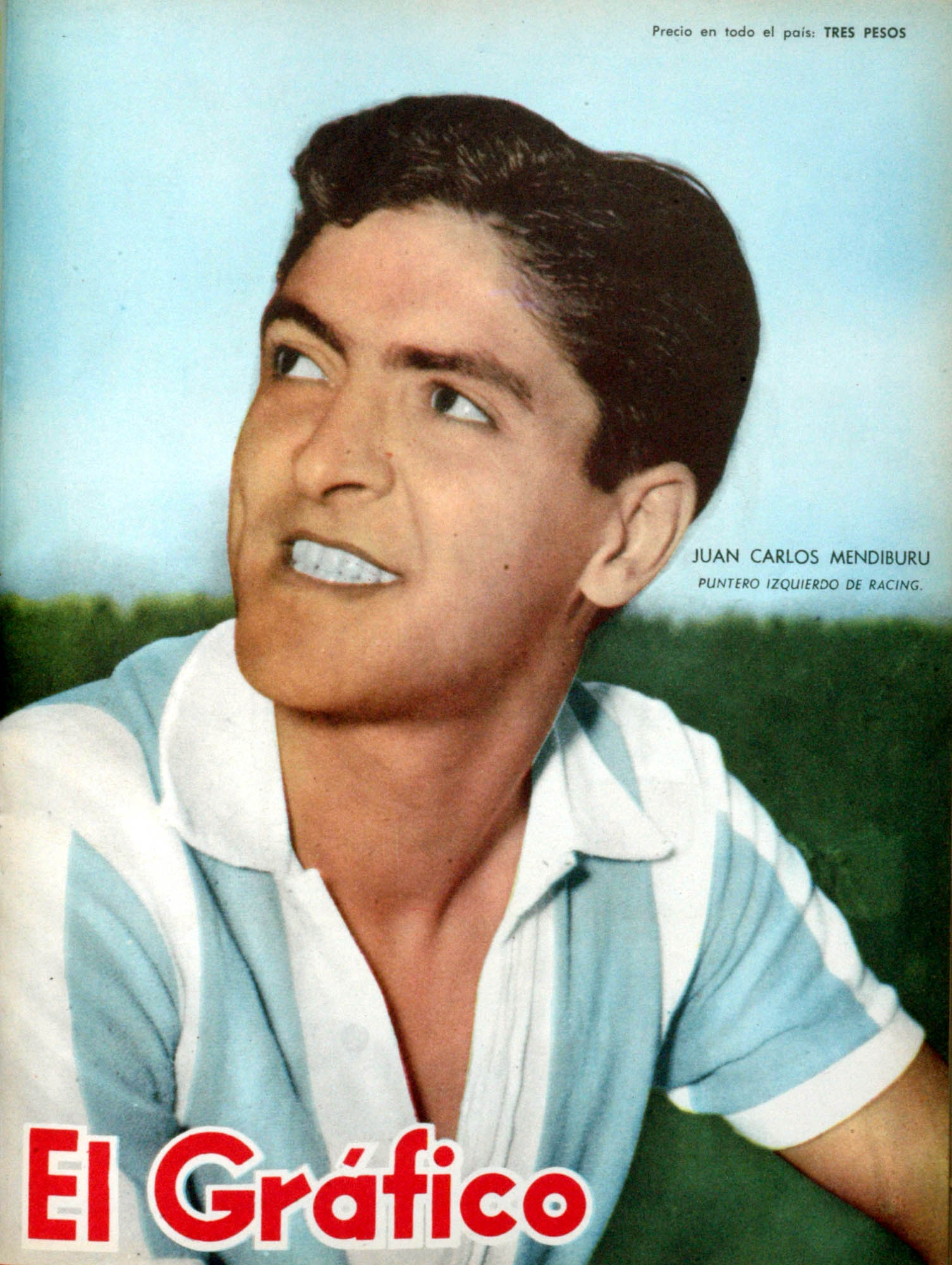 El Grafico del 04 de Octubre de 1957. Edicion 1986